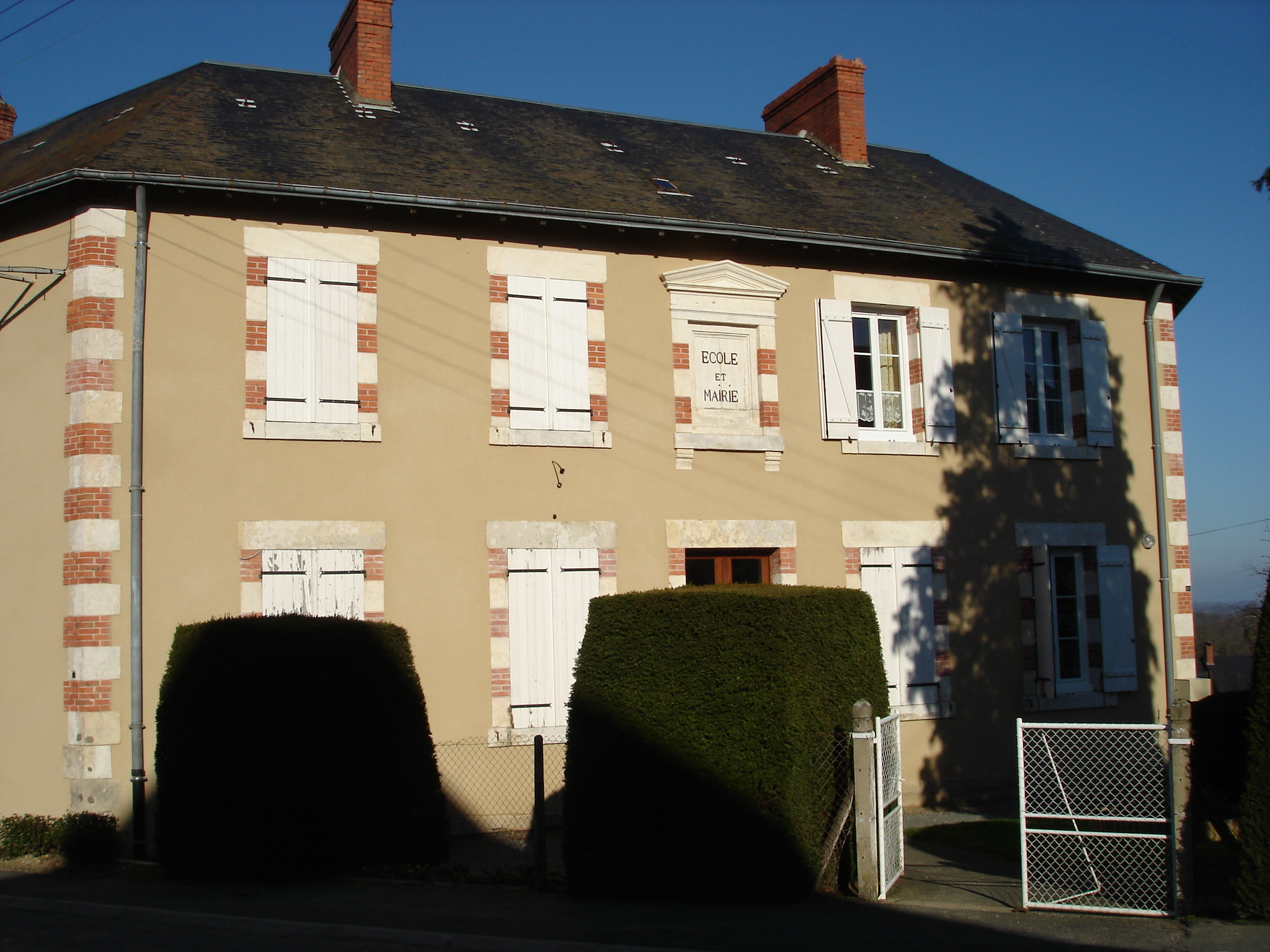 Sazeray (36) : La mairie.